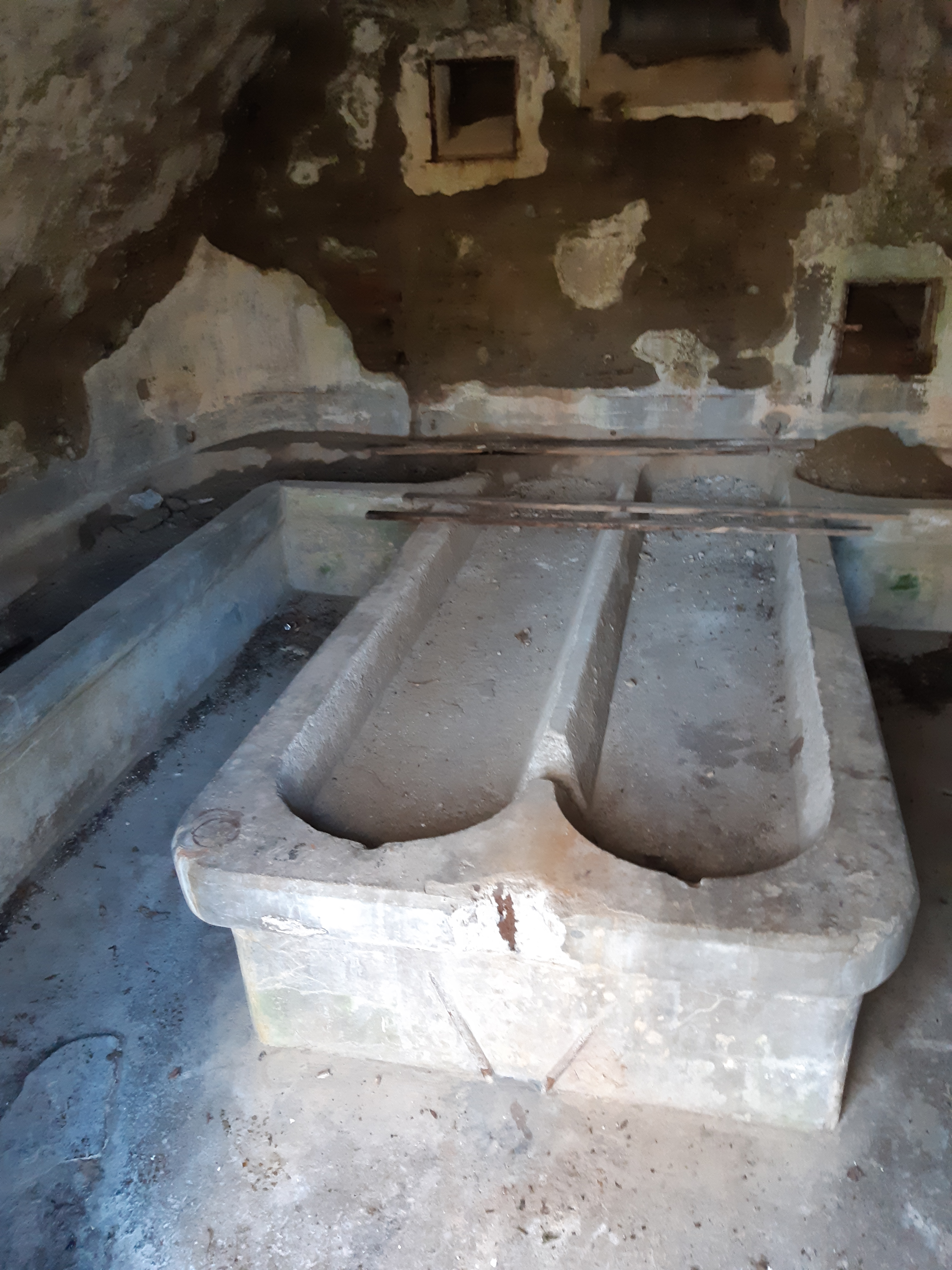 ehemalige Genossenschaftsmolkerei in Monteggio, Schweiz. Innenansicht